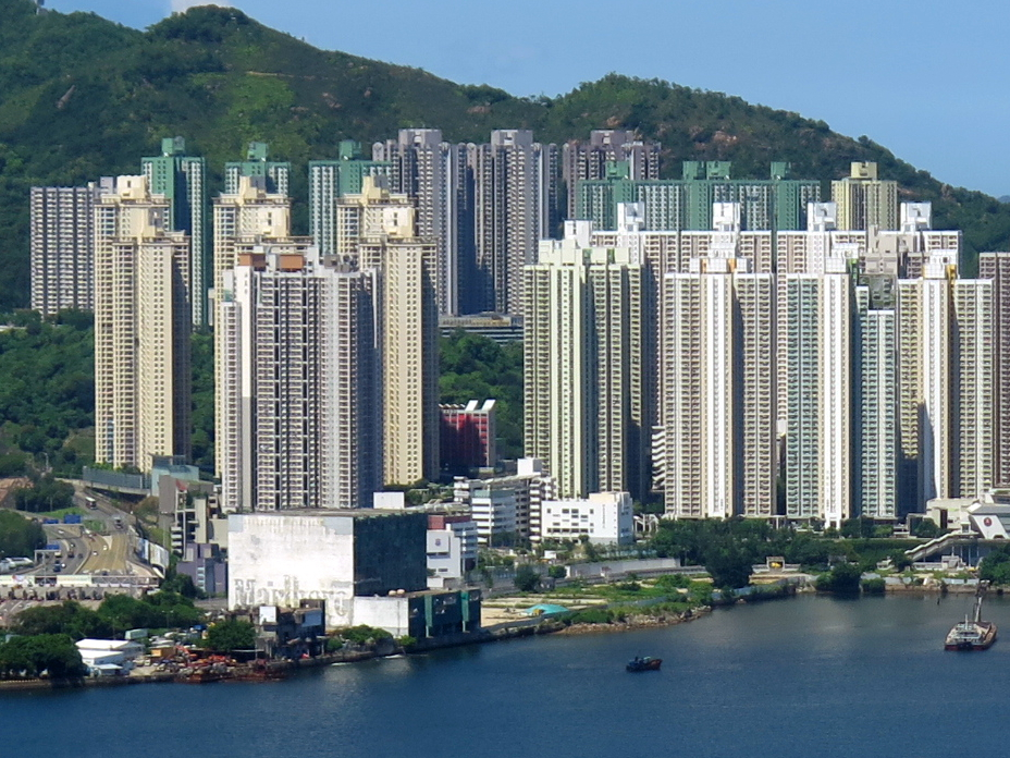 Yau Lai Estate